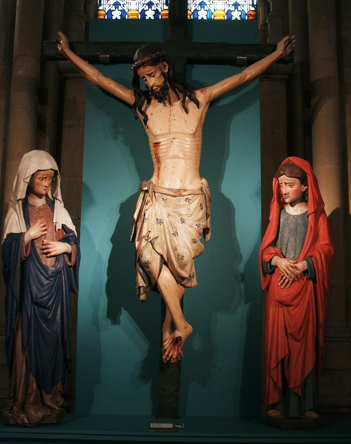 Calvario de Eguileta (s-XIV), Museo Diocesano de Arte Sacro de Álava, situado en la girola de la Catedral Nueva de Vitoria-Gasteiz